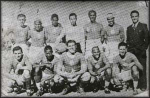 Équipe du Wydad de Casablanca en 1940 lors de la saison 1939-1940 soit sa toute première